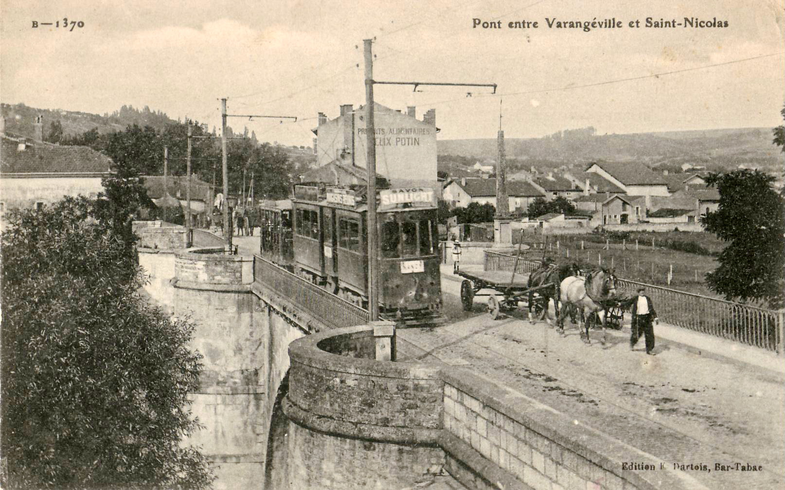 Carte postale éditée par E. Dartois, n°B-1370, bar-tabac : Pont entre Varangéville et Saint-Nicolas. Vue du tramway Nancy - Dombasle-sur-Meurthe de la compagnie des tramways suburbains